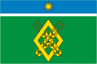 Флаг Харьковского сельского поселения, Краснодарский край, Россия.